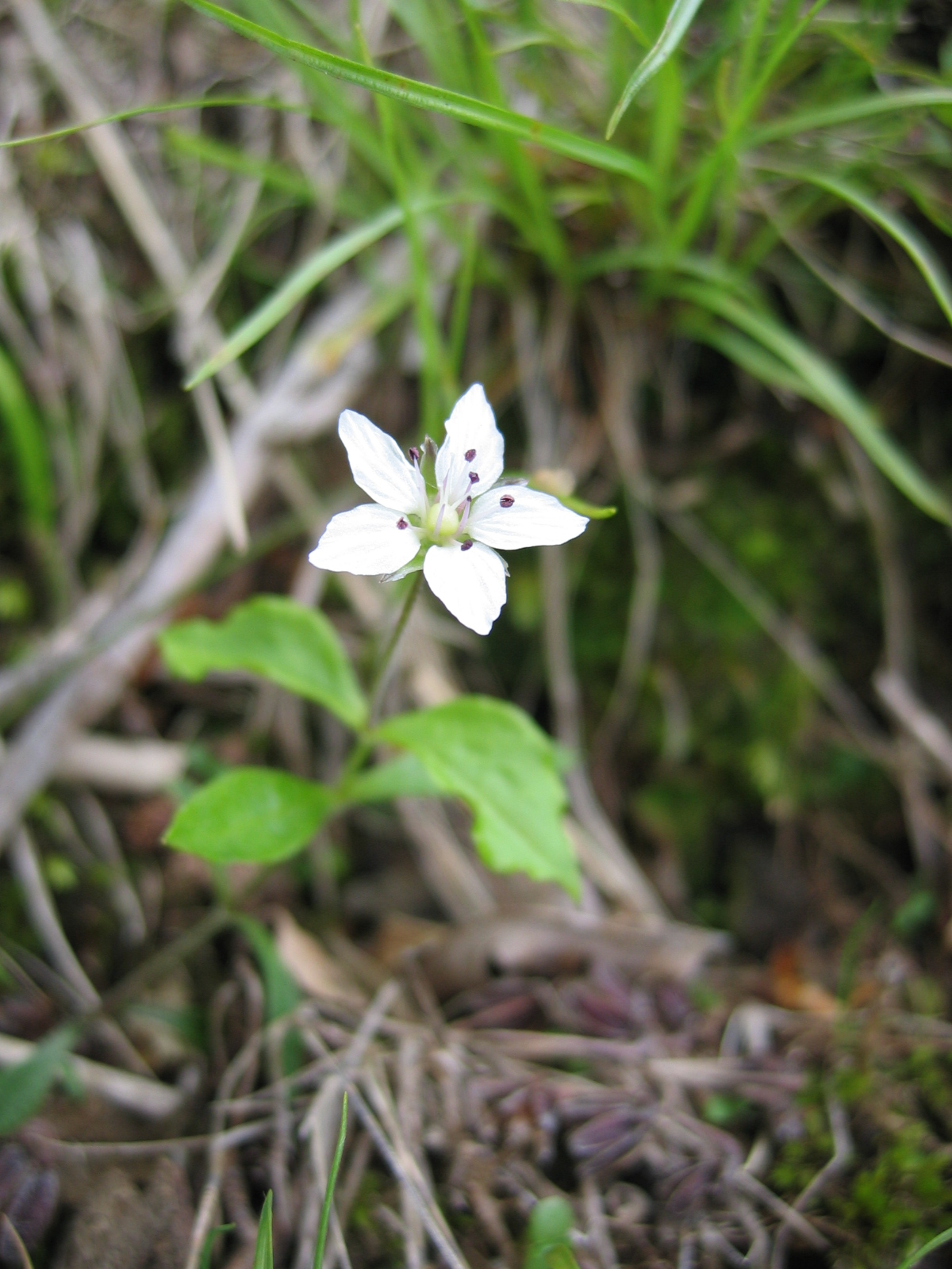 ワチガイソウ 丹沢山にて撮影。